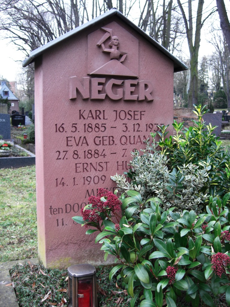 Grab des Dachdeckers und Karnevalisten Ernst Neger, 1909-1989, und seiner Familie auf dem Hauptfriedhof Mainz